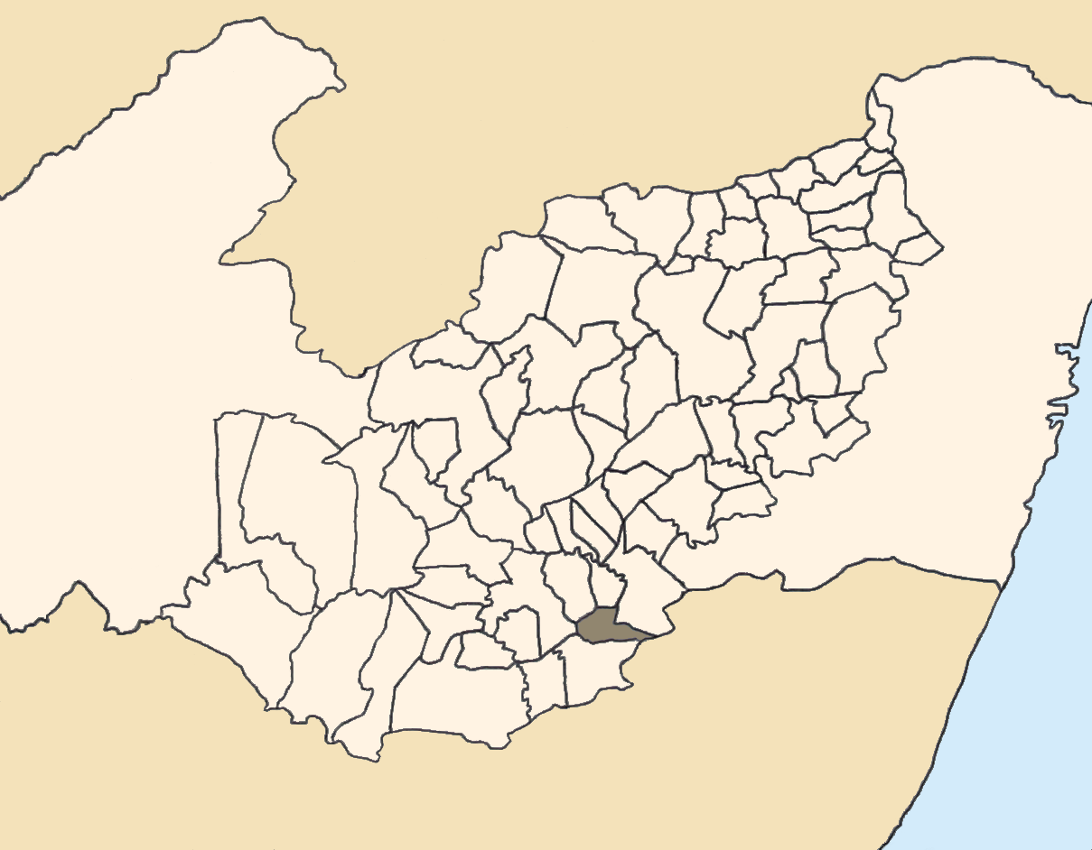 Mapa da mesorregião Agreste de Pernambuco (Brasil) subdivida em municípios. Em destaque, o município de Palmeirina. Map of the brazilian state of Pernambuco (mesorregião Agreste) showing the city of Palmeirina. Imagem tratada com o GIMP. Image made with GIMP.